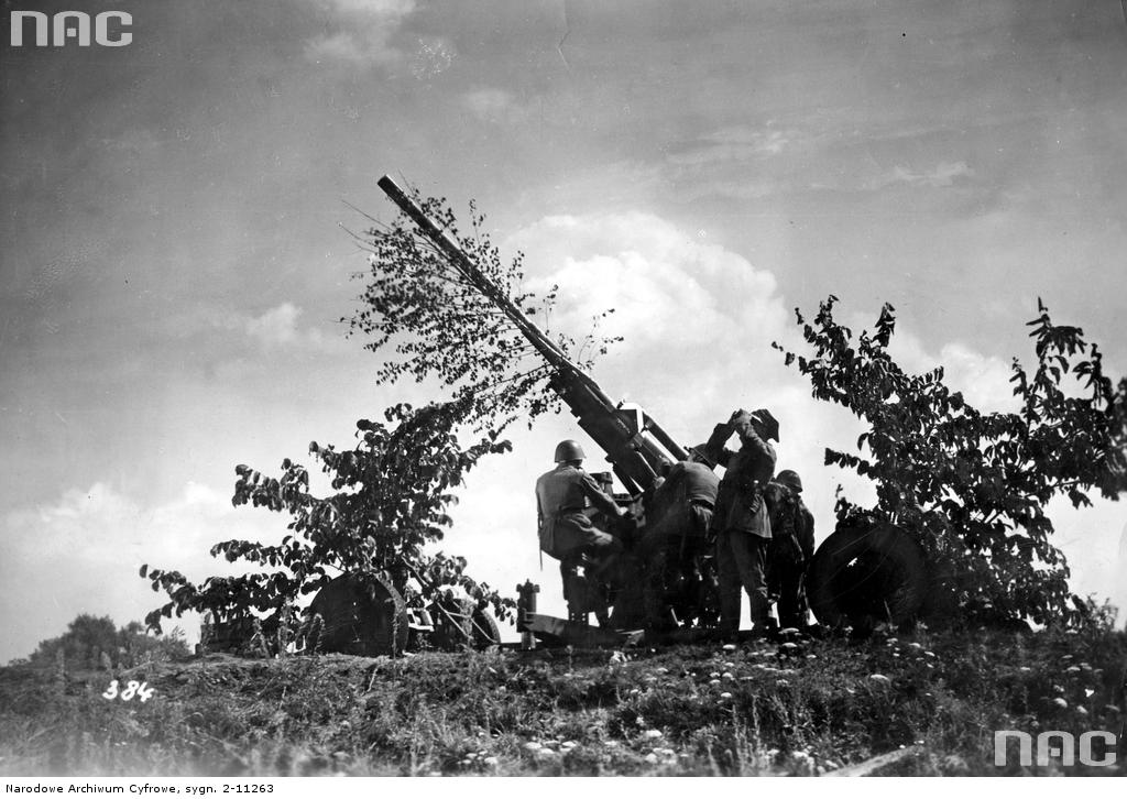 Scena z filmu. 75 mm armata przeciwlotnicza wz. 36 na stanowisku. Żołnierze słowaccy w polskich mundurach i hełmach wz. 31.